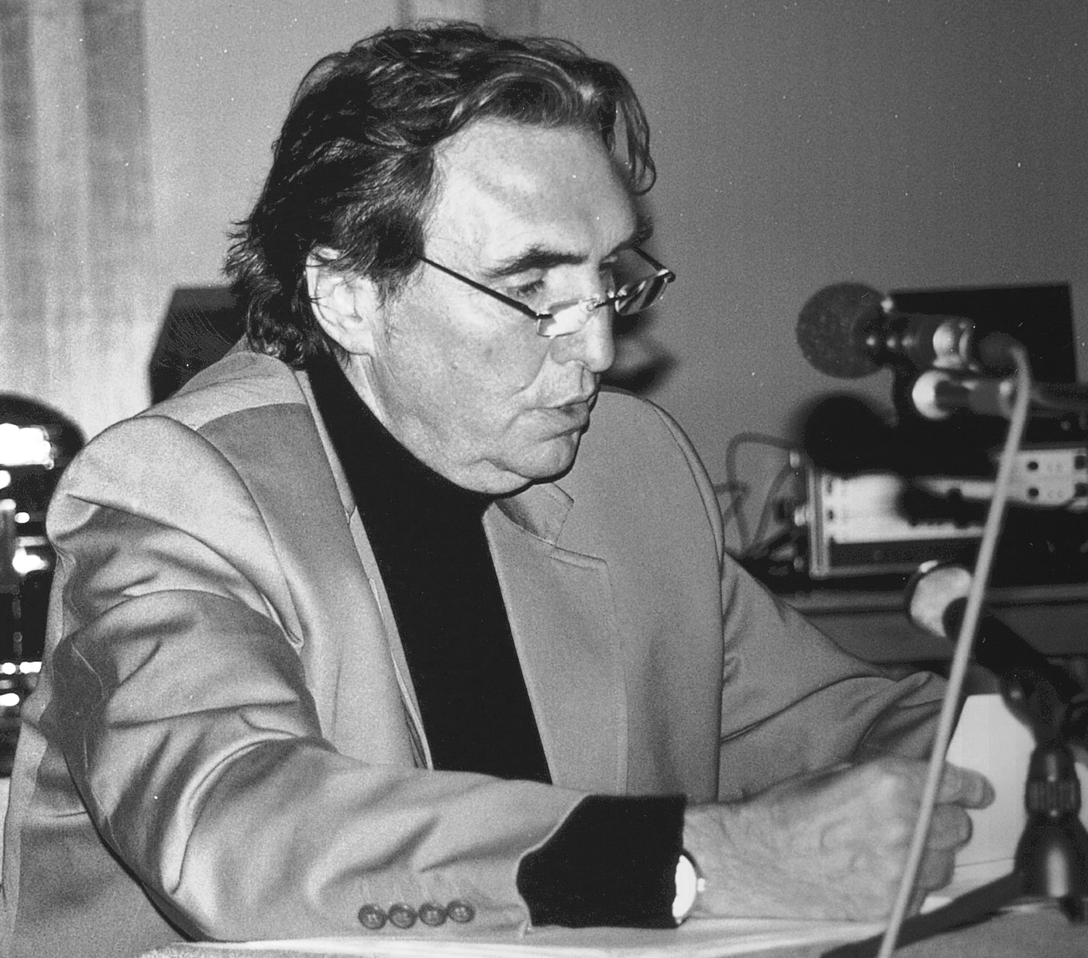 Porträt des Schriftstellers Manfred H. Freude